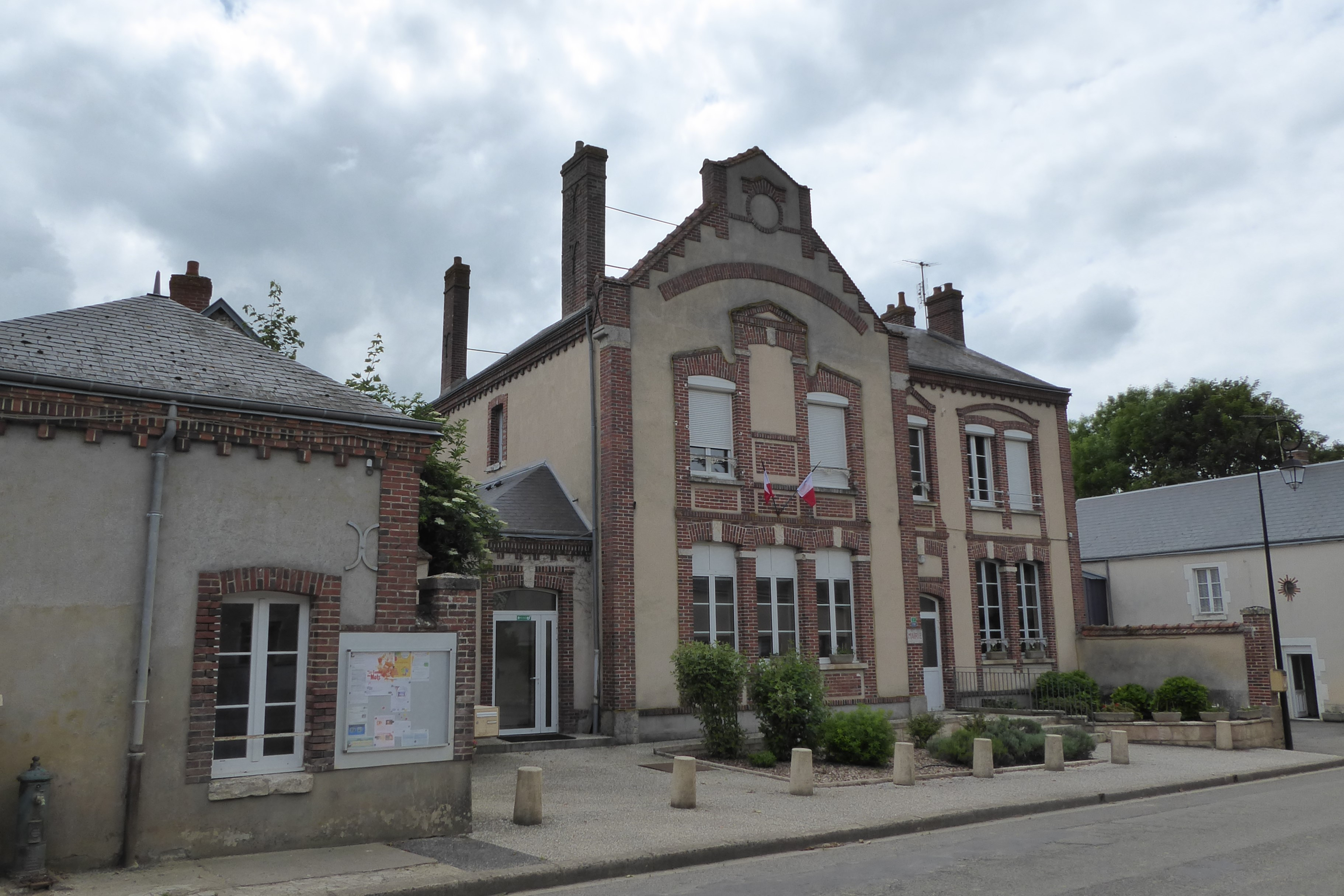 mairie-école de Lumeau, Eure-et-Loir, France.